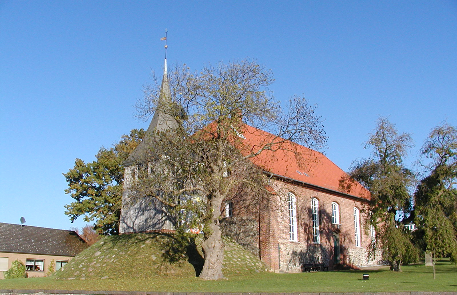 Die Kirche